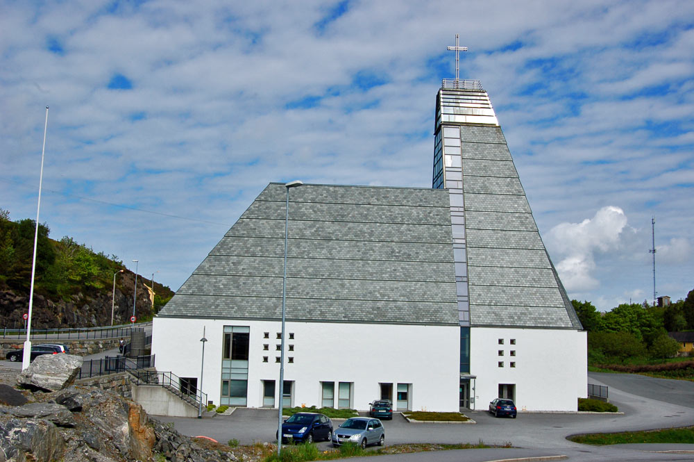 Herøy kirke